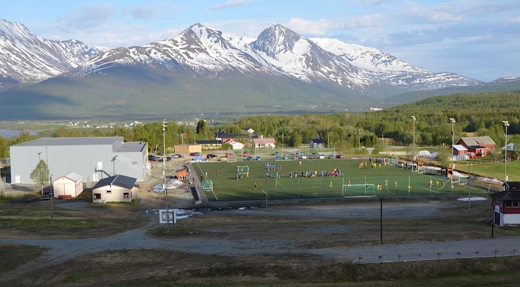 Moan kunstgress